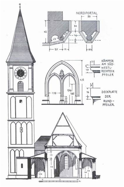 Querschnitt St. Petrus Wörth an der Donau